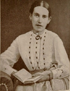 Cordula Wöhler, katholische, deutsche Dichterin